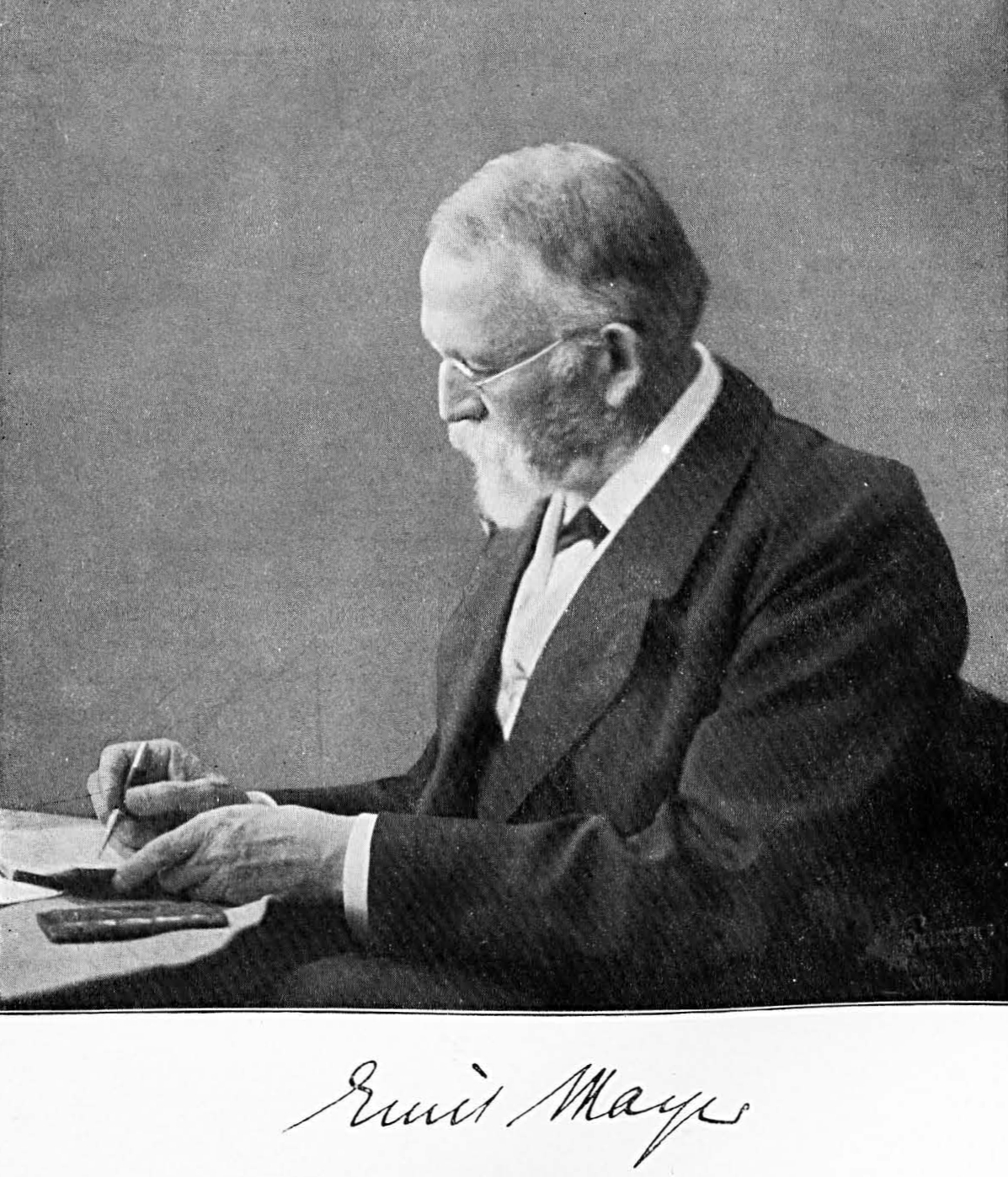 Porträt des Architekten Emil Mayer (1845–1910).